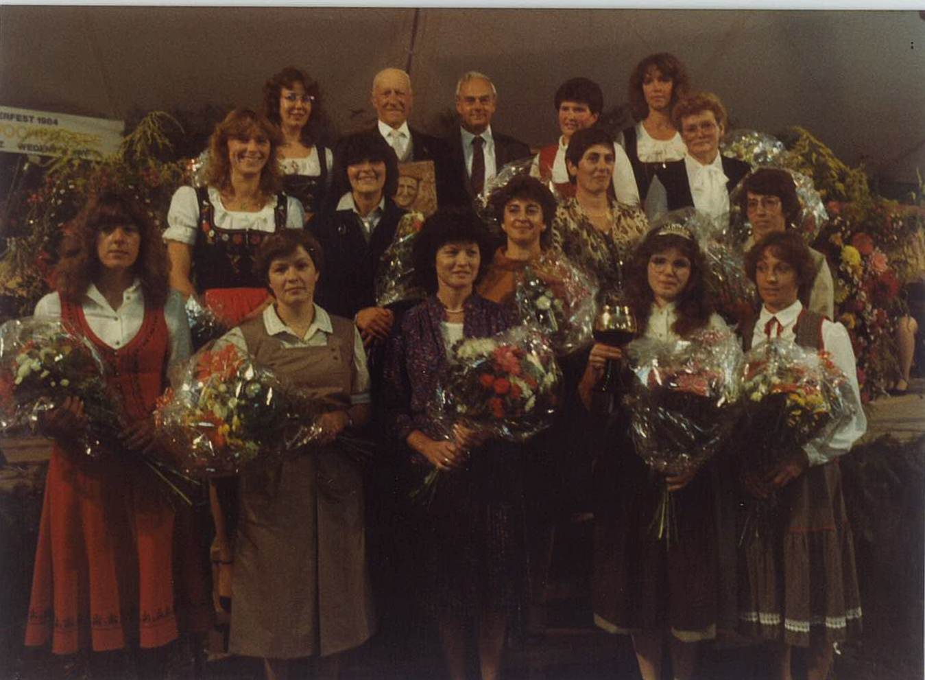 Erzinger Winzerfest in der Ortschaft Erzingen (Klettgau) im Landkreis Waldshut in Baden-Württemberg. Zur Eröffnung des Winzerfestes 1983 präsentierten sich alle bisherigen Weinprinzessinnen. In der Mitte oben links Heinrich Winter, „Rebenvater“.